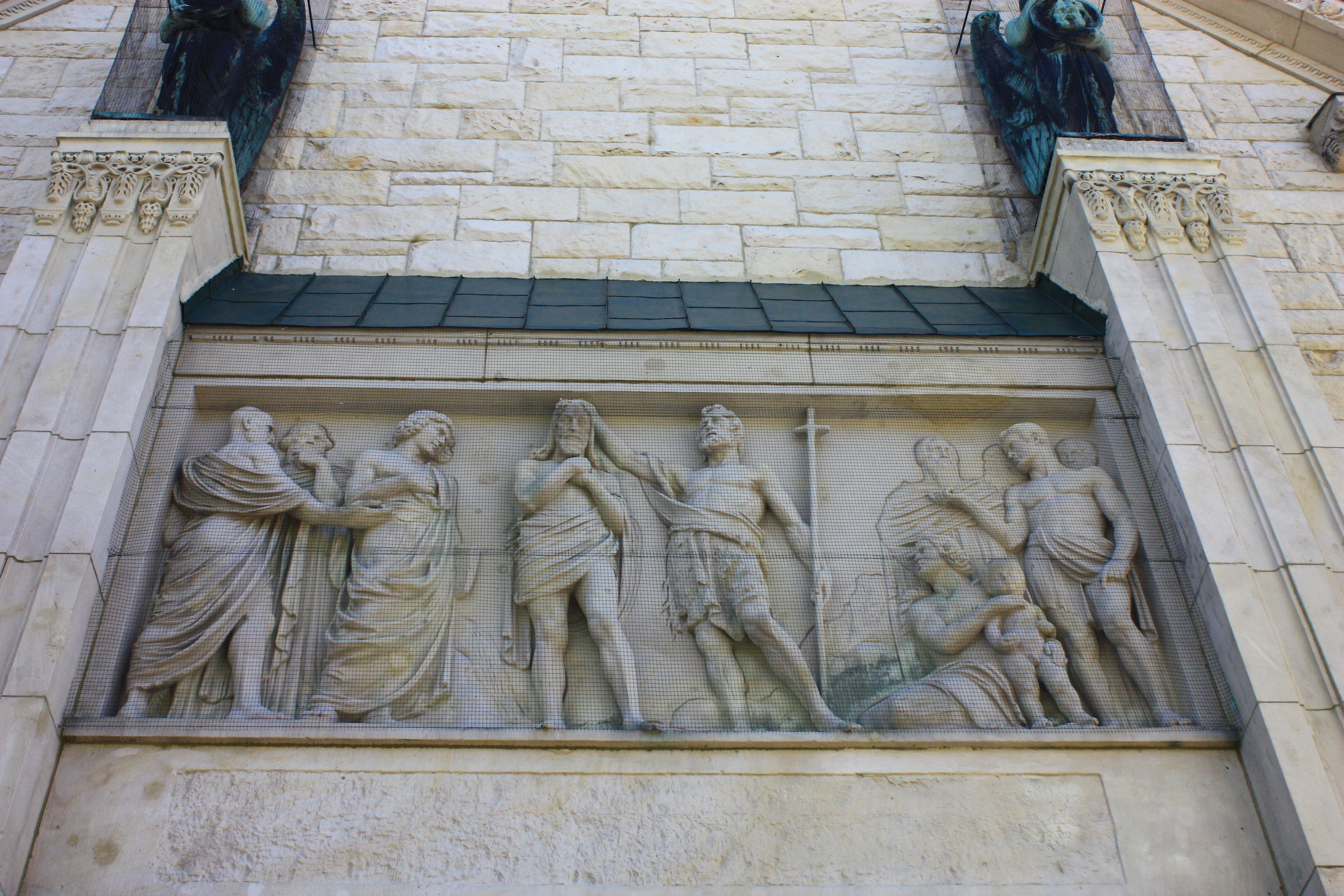 Wrocław, zespół kościoła ewangelicko-augsburskiego, ob. rzym.-kat. p.w. św. Augustyna, 1909